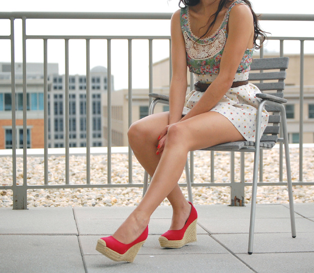 Vintage Reworked Skirt, Vintage Espadrilles, Blumarine blouse